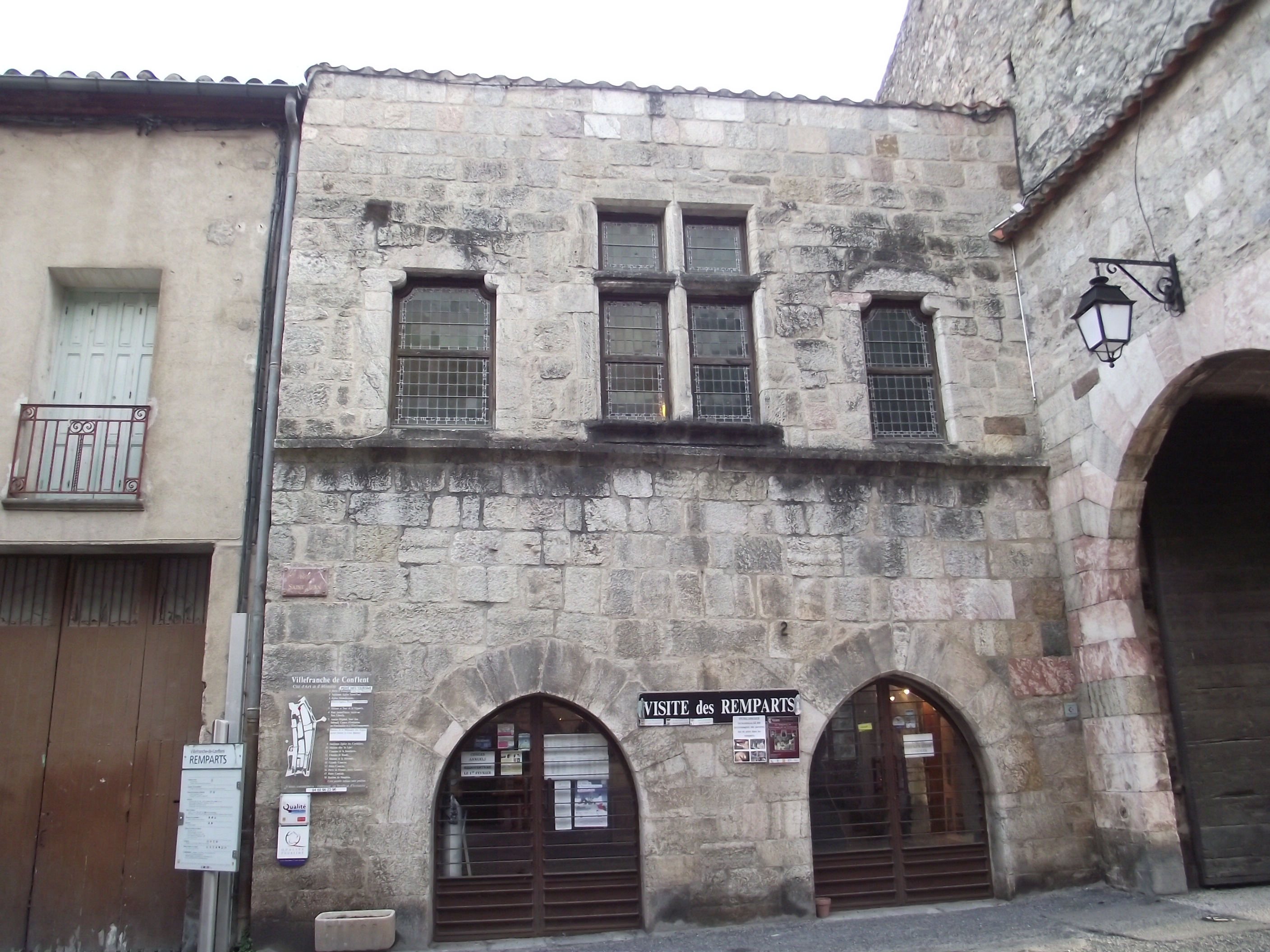 Casa Boyer (Vilafranca de Conflent)